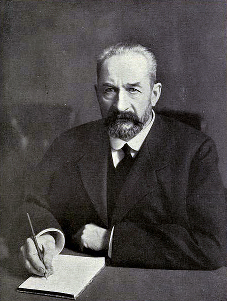 El político liberal ruso, príncipe Georgi Lvov, primer primer ministro del Gobierno Provisional.